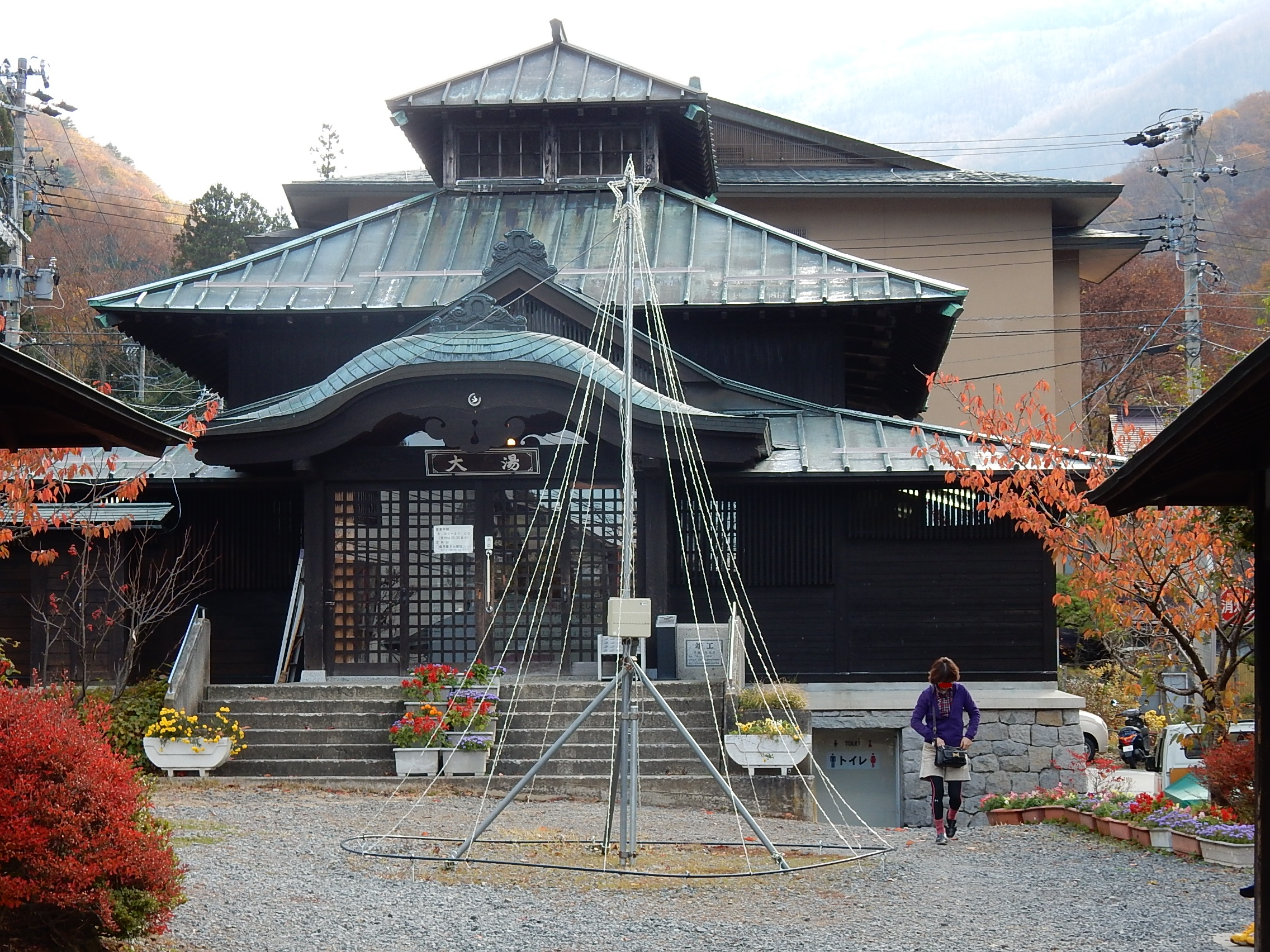 長野県高山村山田温泉大湯